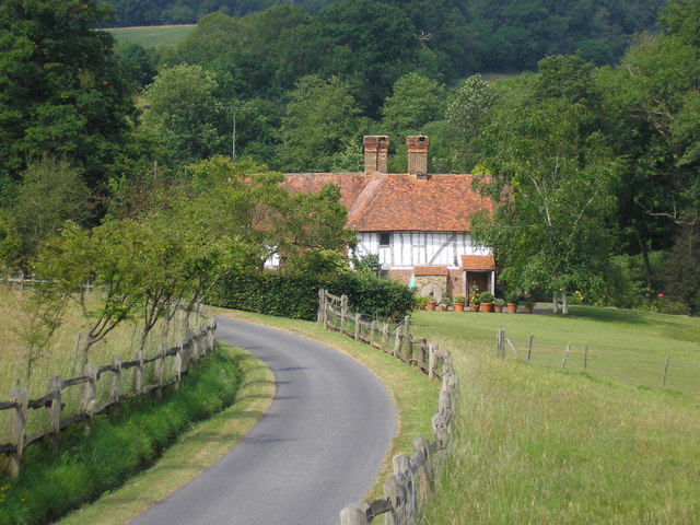 Bassett's Mill, Kent